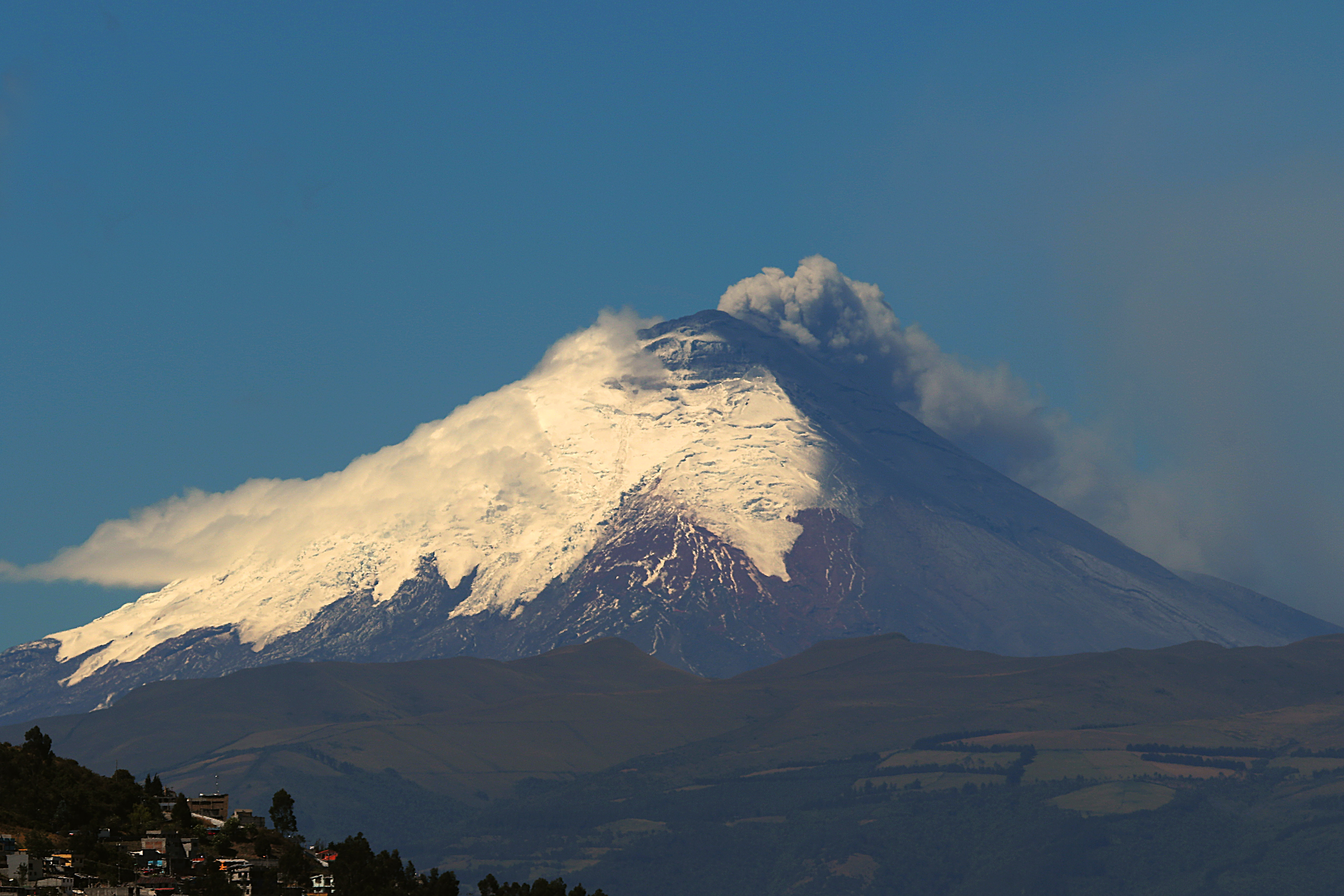 Quito, 18 Ago (Andes).- El volcán Cotopaxi presenta actividad con emisión de cenizas y gases esta mañana. Fotografías: Carlos Rodríguez/Andes.